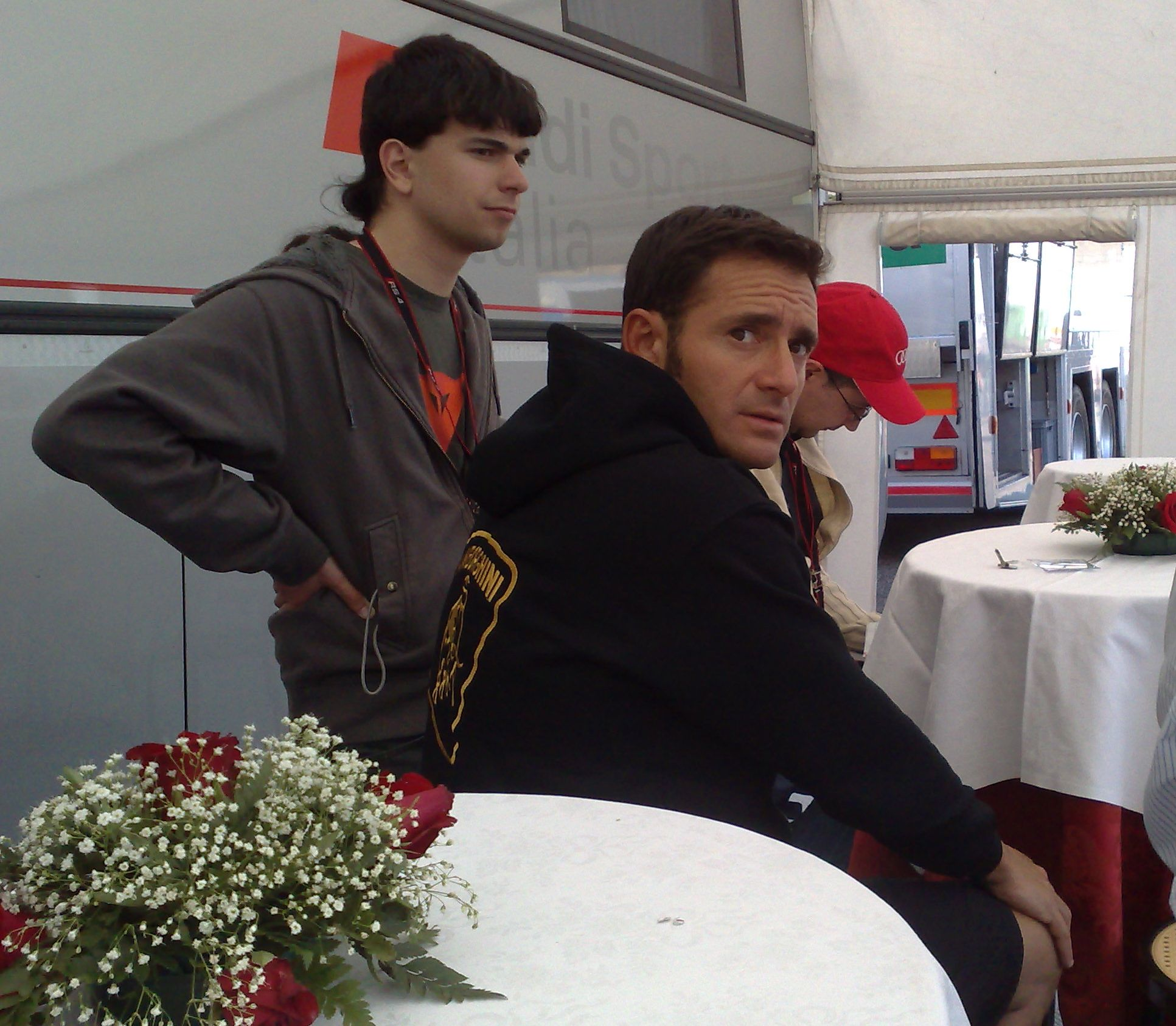 Il pilota automobilistico Gianni Morbidelli